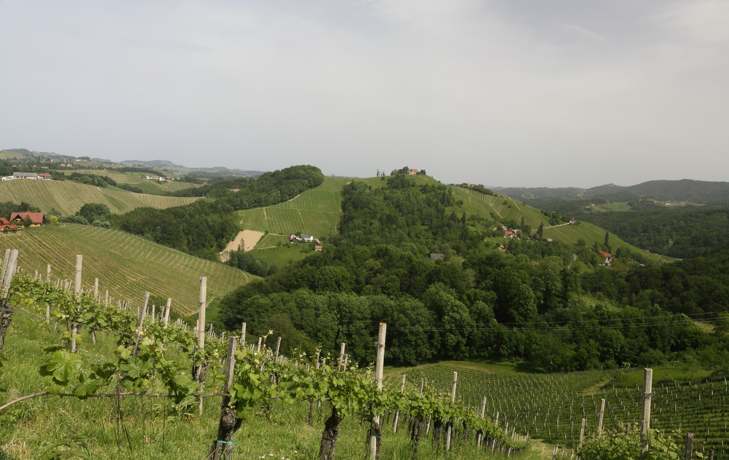 Südsteiermark This file shows the Nature Park with the ID 6404 in Austria.